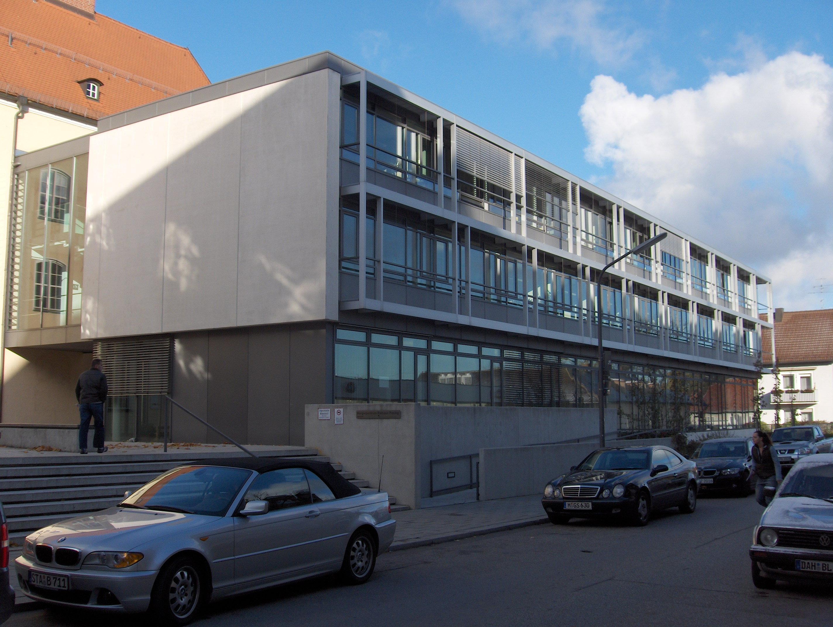 Beschreibung: Bürgerzentrum Rathaus Pasing Quelle: Bild selbst erstellt Datum: 02.11.2006 Autor: Lemming40